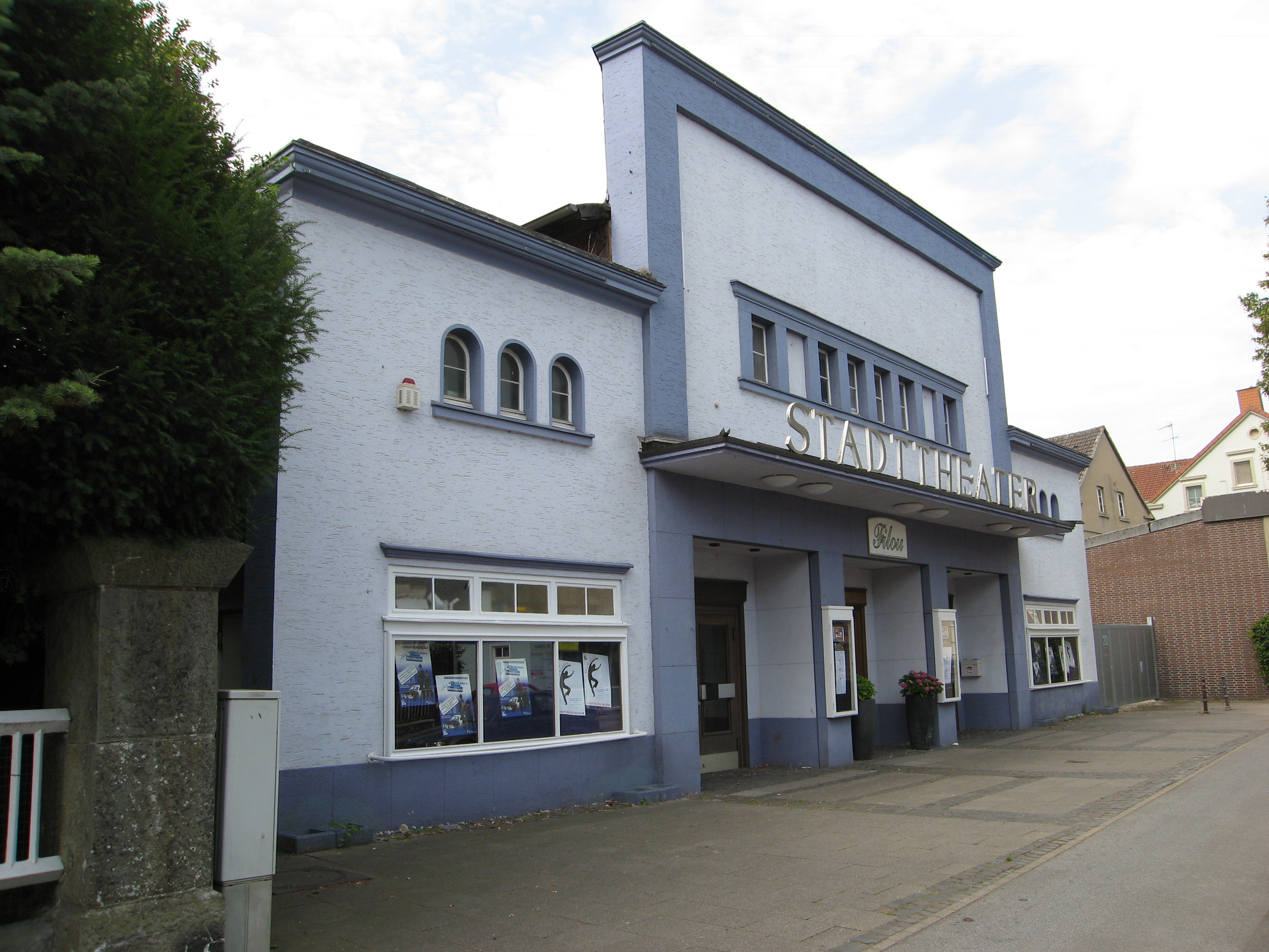 Stadttheater, Baudenkmal seit 1. März 1999This is a photograph of an architectural monument.It is on the list of cultural monuments of Beckum